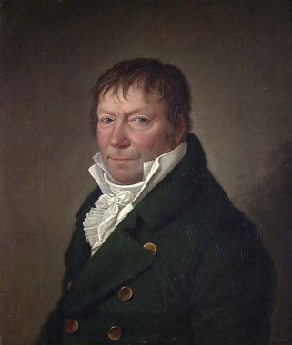 Norwegian: Portrett av Olav Olavsen (1753-1832), islandsk-norsk arkitekt, jurist og stortingsmann.title QS:P1476,no:"Portrett av Olav Olavsen (1753-1832), islandsk-norsk arkitekt, jurist og stortingsmann." label QS:Lno,"Portrett av Olav Olavsen (1753-1832), islandsk-norsk arkitekt, jurist og stortingsmann."